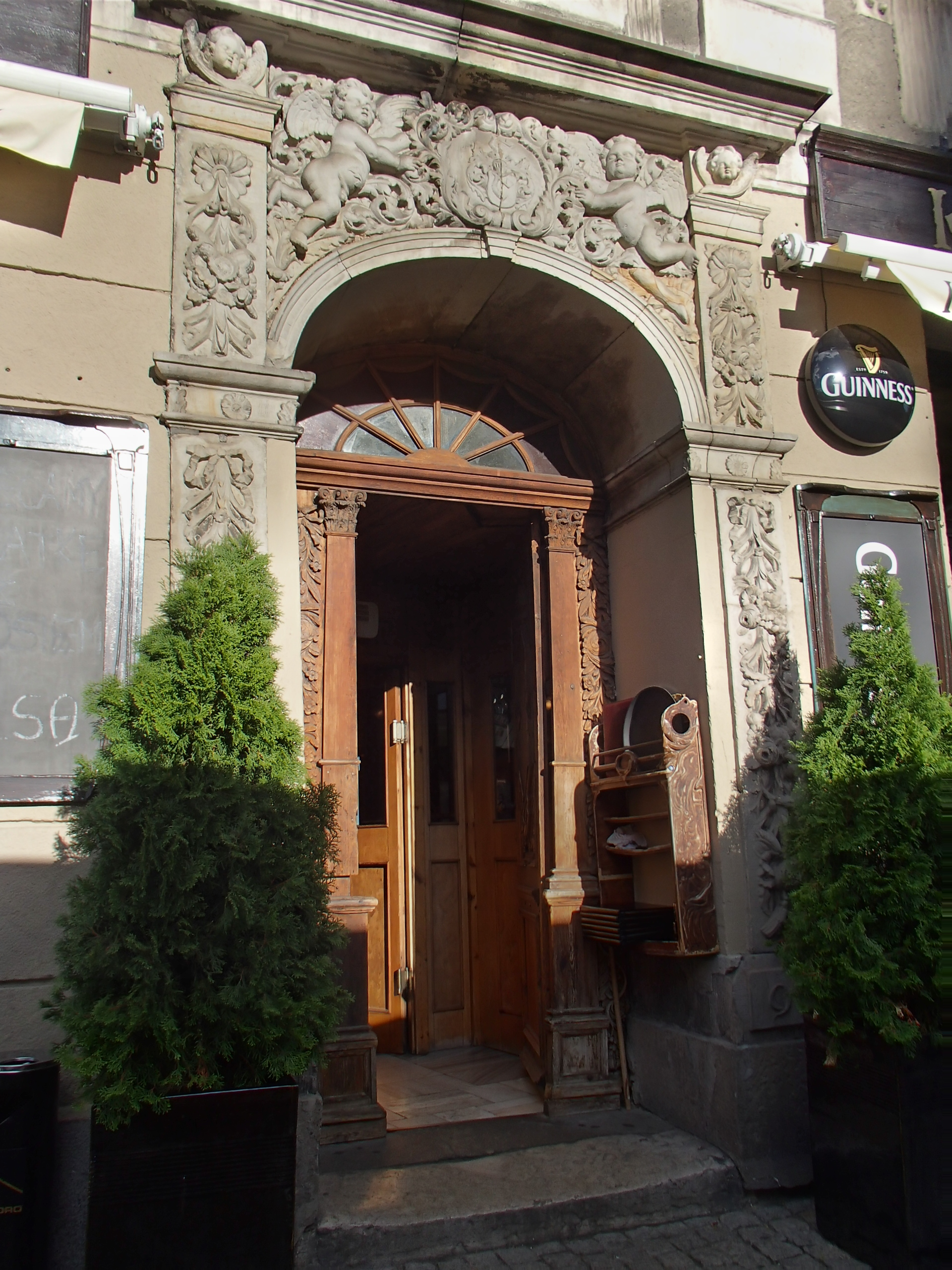 Toruń, Rynek Staromiejski 29 - fasada z portalem kamienicy, XV, XVII/XVIII, XVIII/XIX w. (zabytek nr A/79/212)